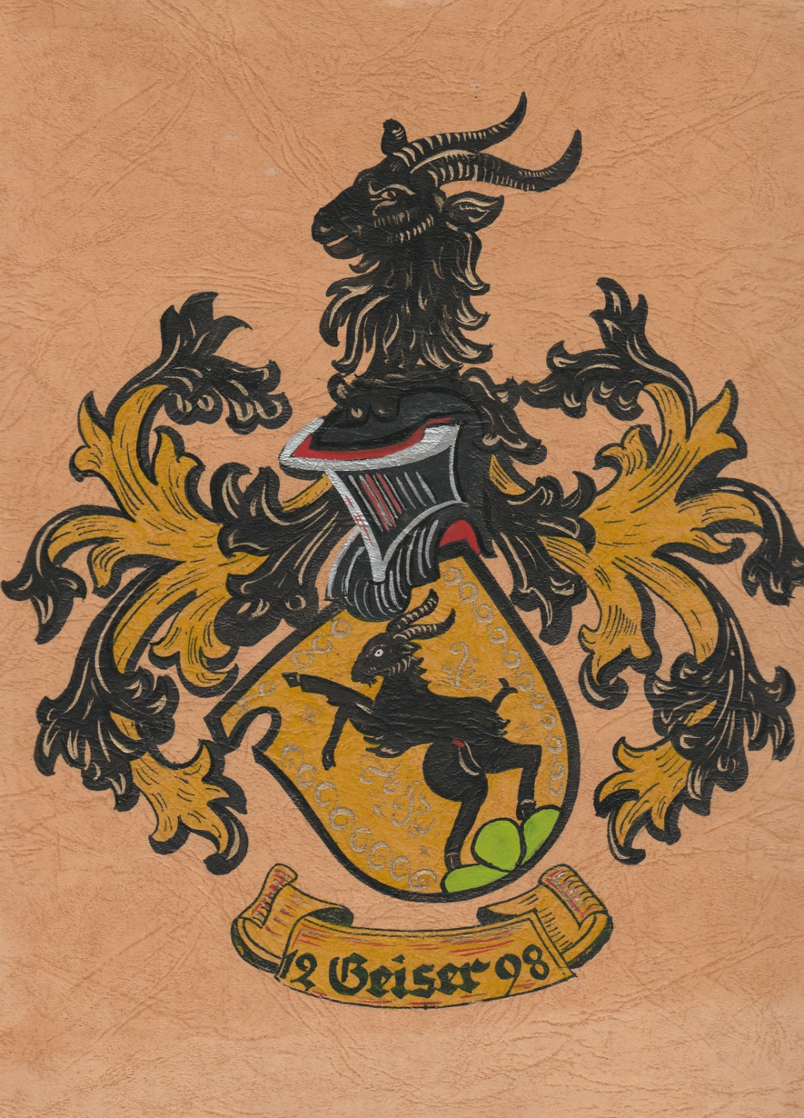 Familienwappen der Schweizer Familie Geiser - datiert bis 1298 zurück